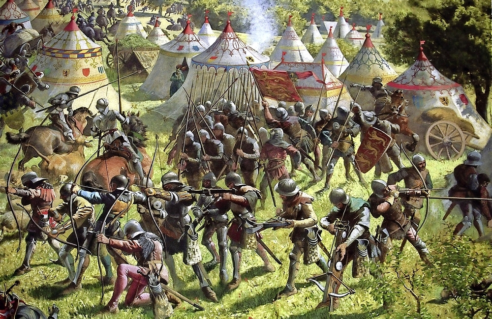 Louis Braun - panorama de la bataille de Morat - détail.